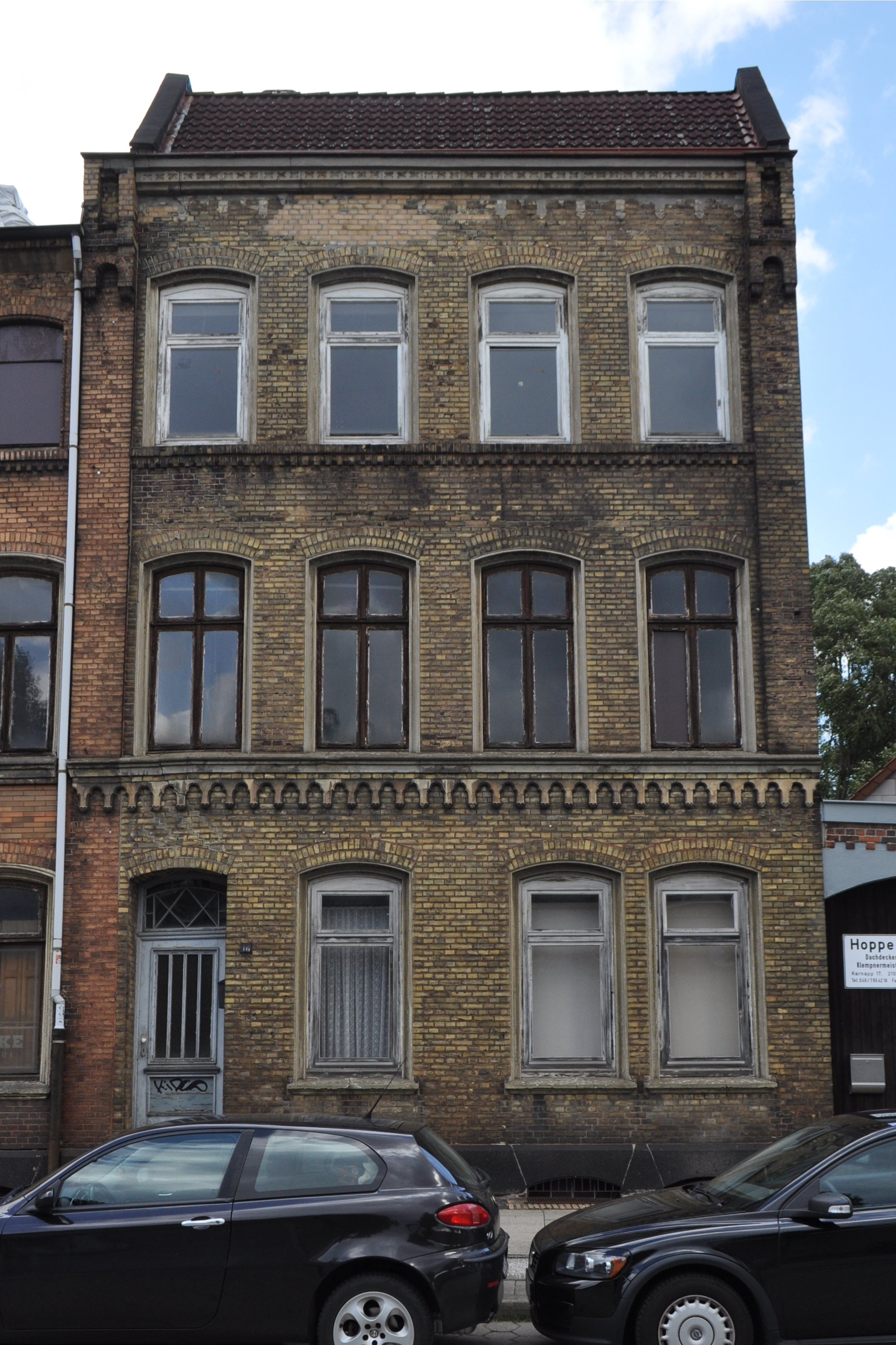 Wohngebäude Karnapp 16 in Hamburg-Harburg. This is a photograph of an architectural monument.